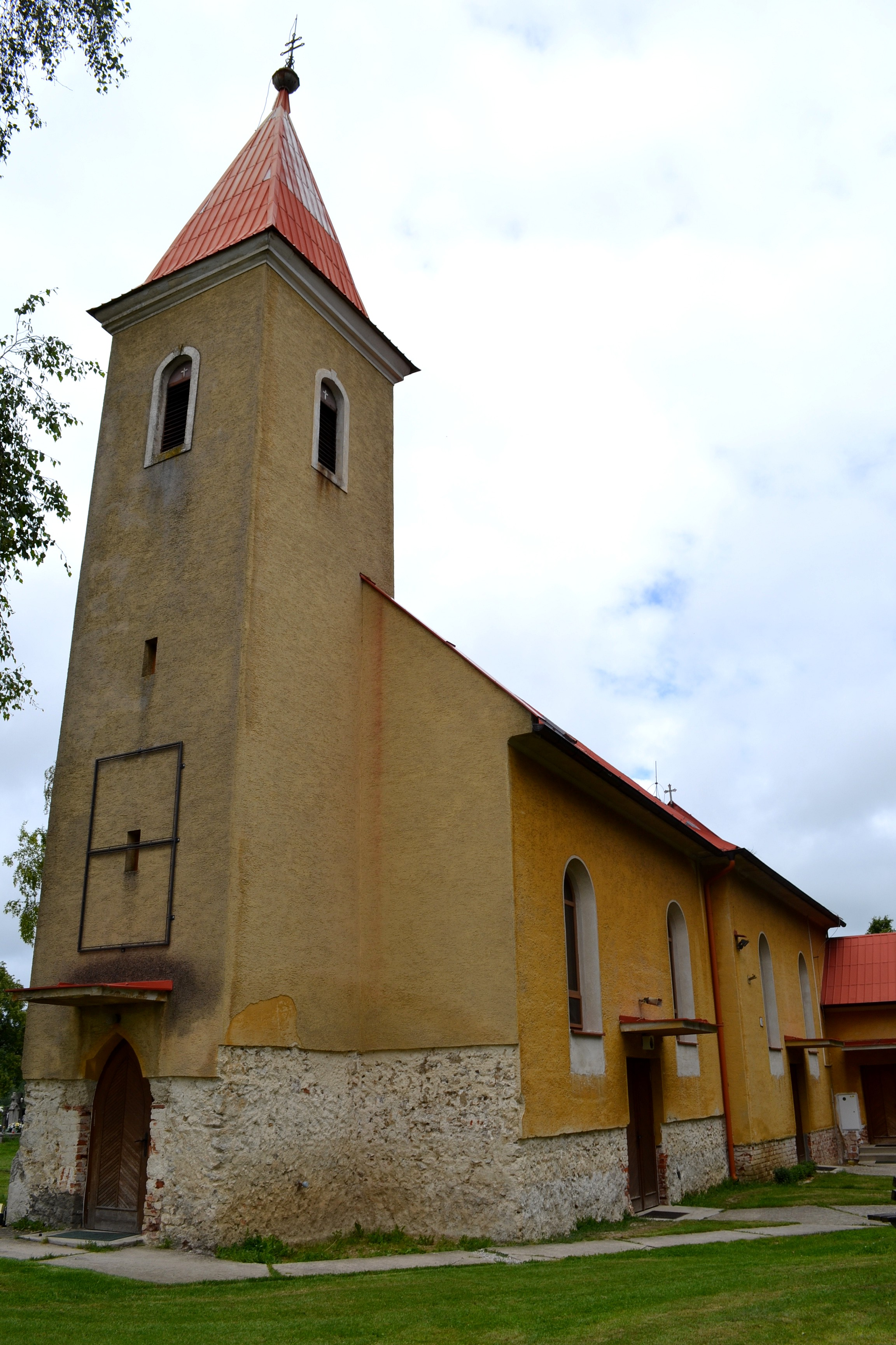 Farský Kostol svätého Michala archanjela v Naháči